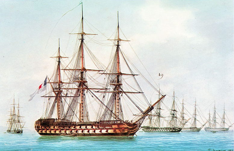 Patriote